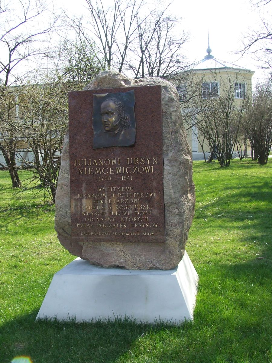 Pałac Juliana Ursyna Niemcewicza, obelisk ku czci założyciela pałacu, z tyłu Aula Kryształowa SGGW